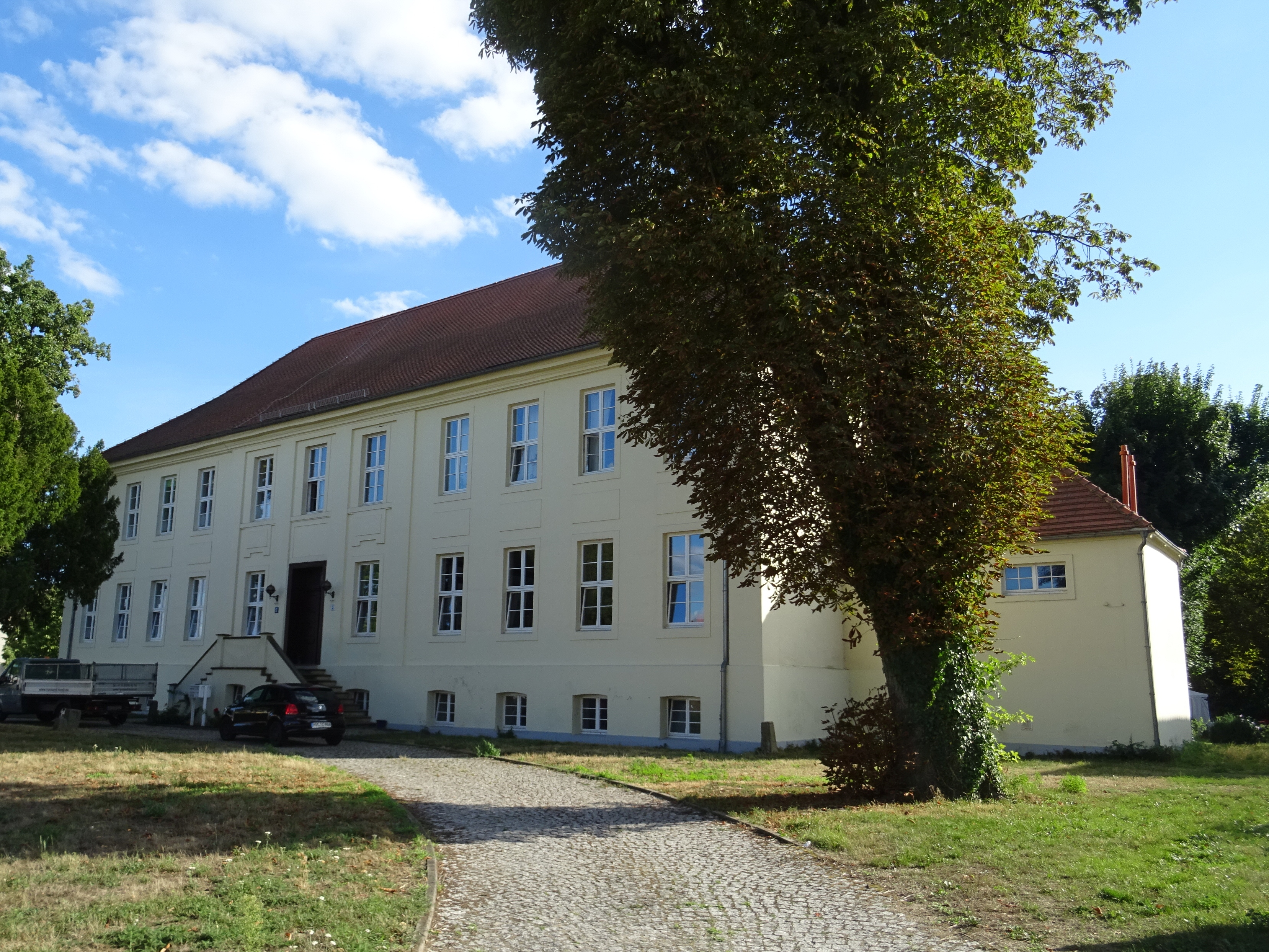 Hohennauen, ehemaliges Herrenhais in der Pareyer Str 7